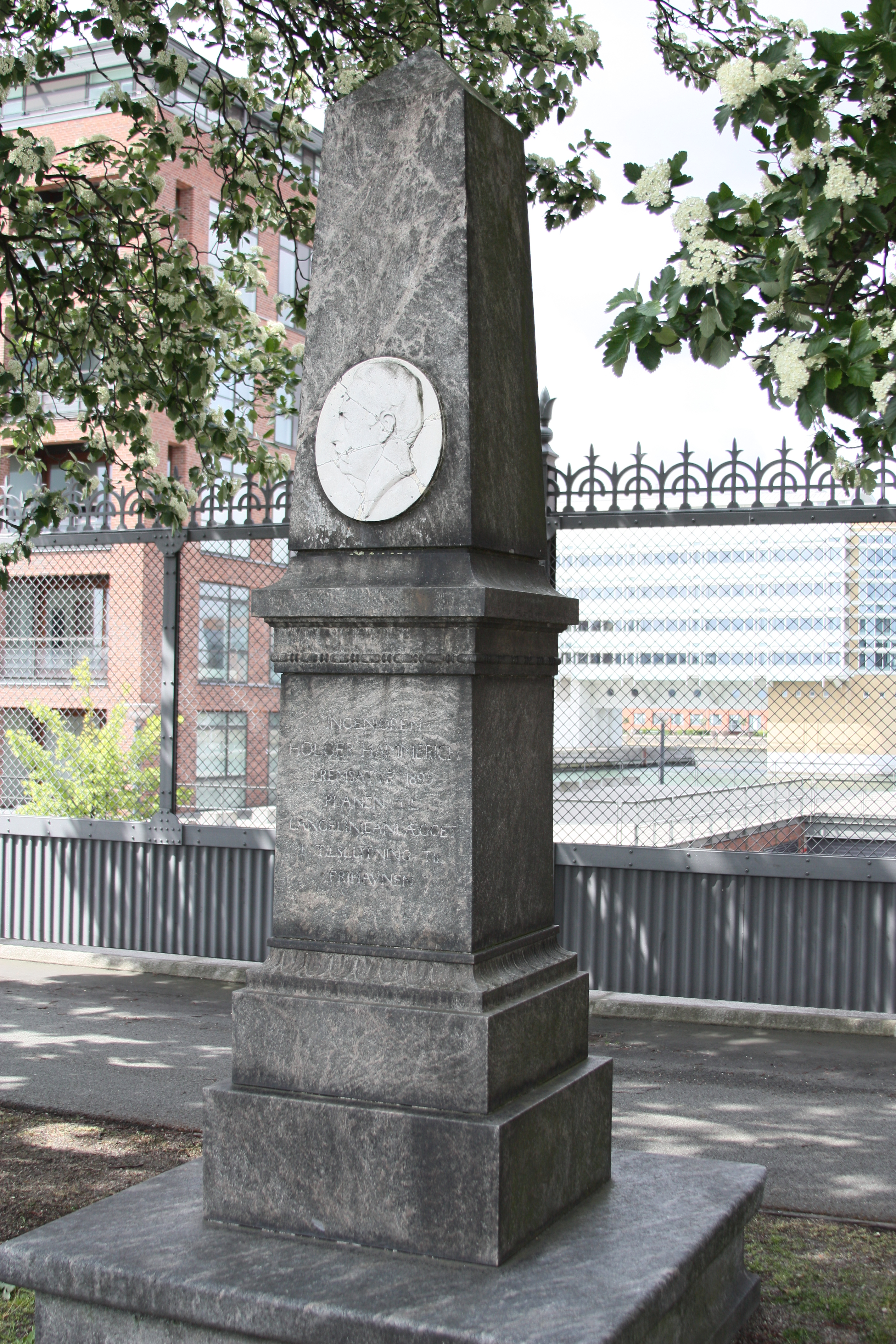 Kopenhagen 2009